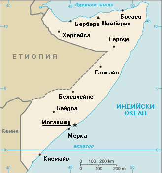 Карта на Сомалия, базирана на създадената от ЦРУ тук